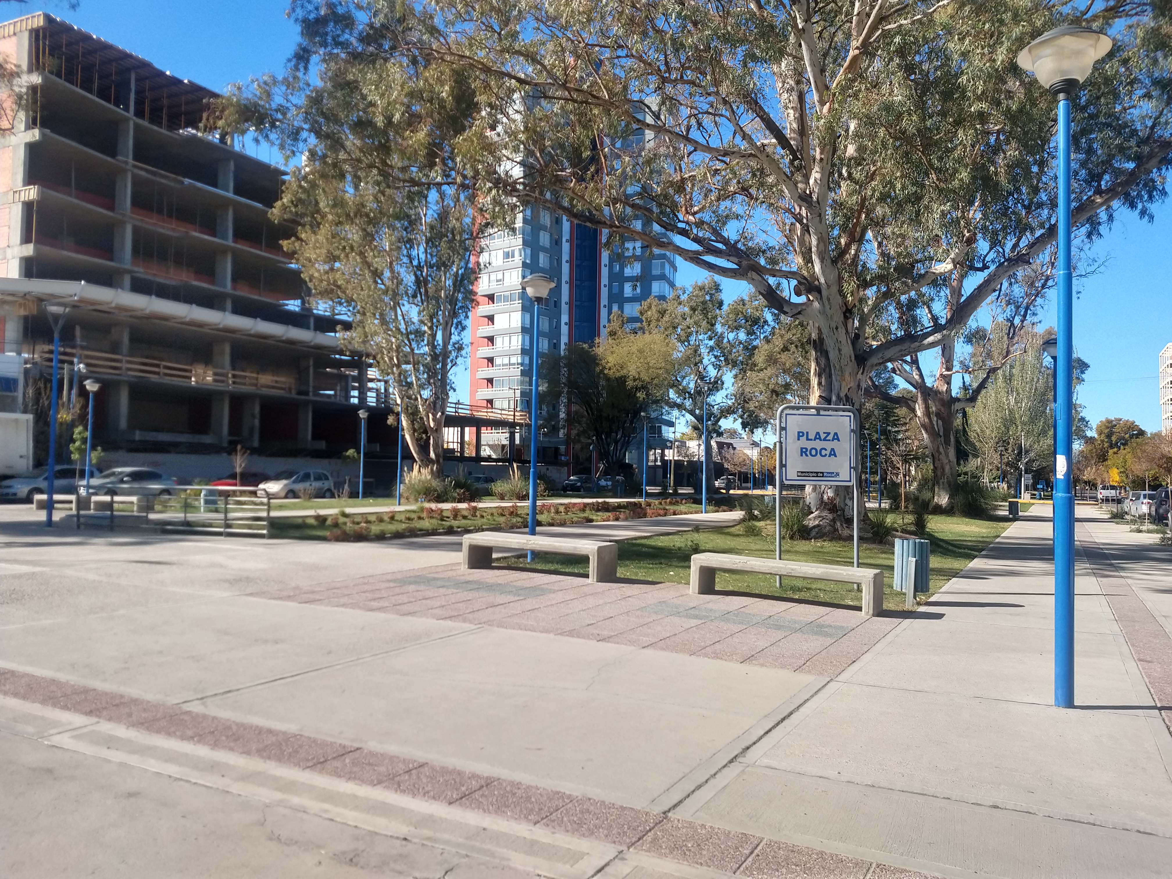 Fotografía de la nueva plaza del canalito de la ciudad de General Roca - Provincia de Rio Negro.